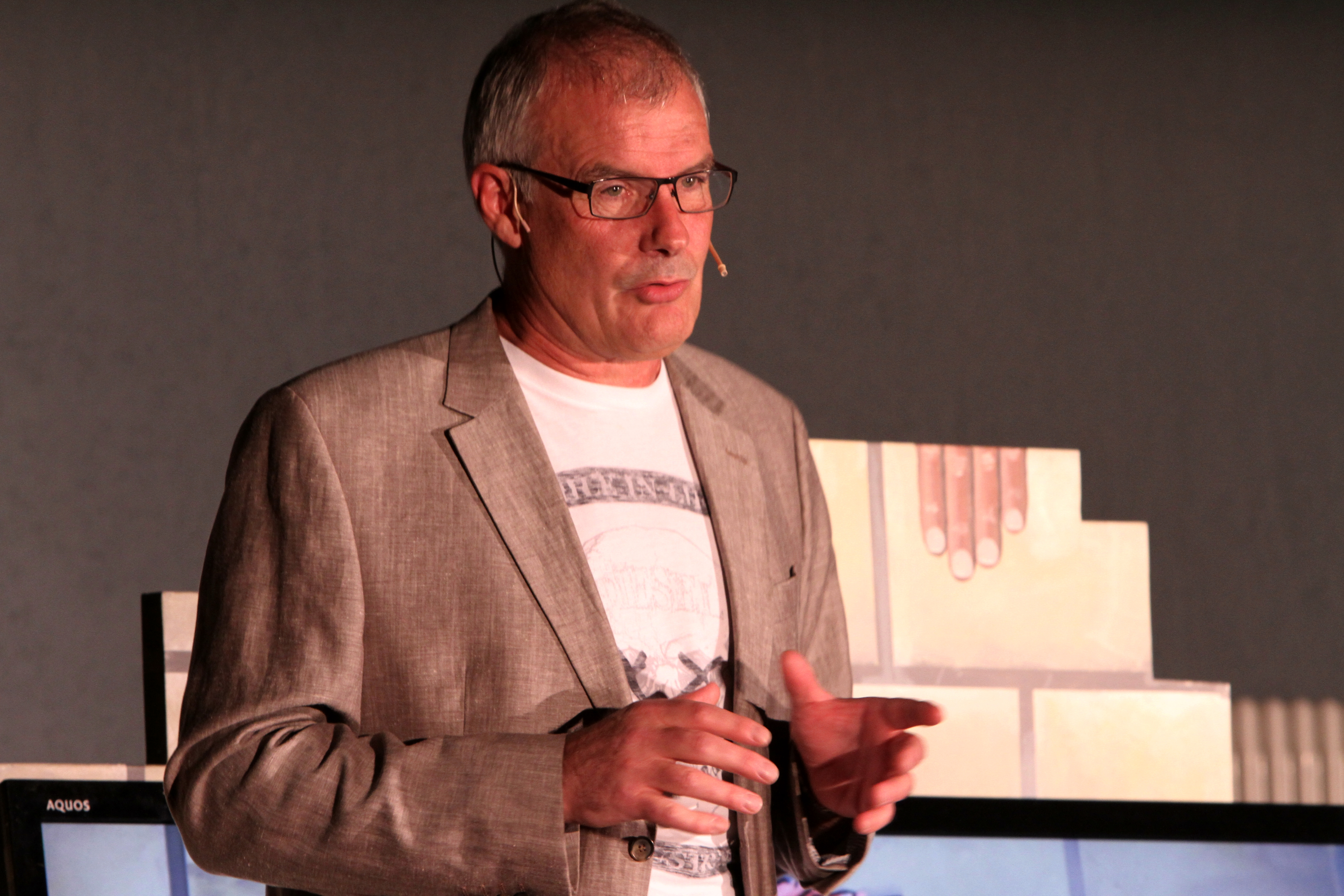 De Roland Gelhausen, opgeholl während dem Roland Gelhausen sengem Solo-Programm 'Wie fäert deen huet Angscht!' am Kulturzenter zu Useldeng. Foto publizéiert mam Accord vum Här Gelhausen.